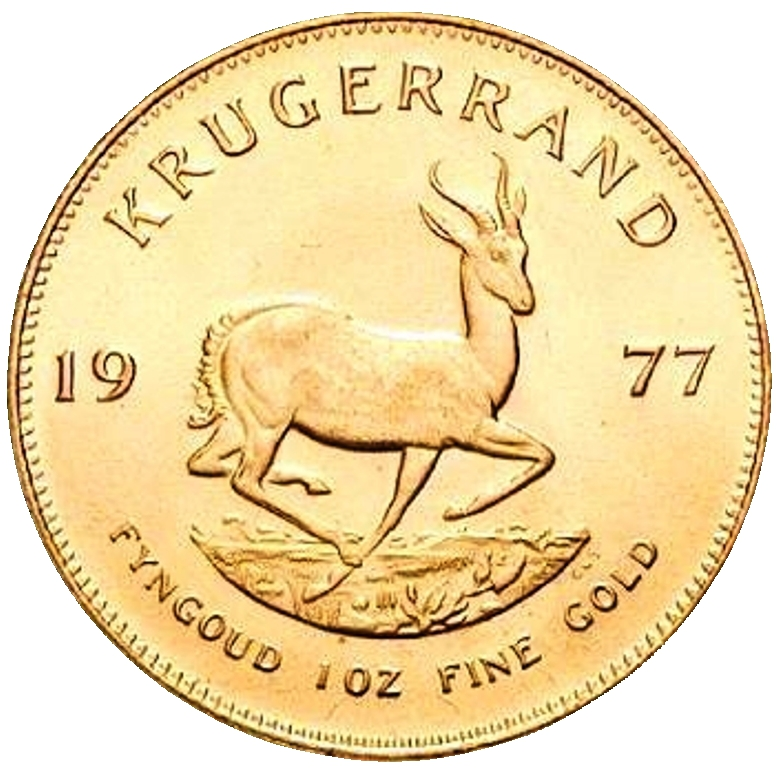 Südafrika Goldunze 1977